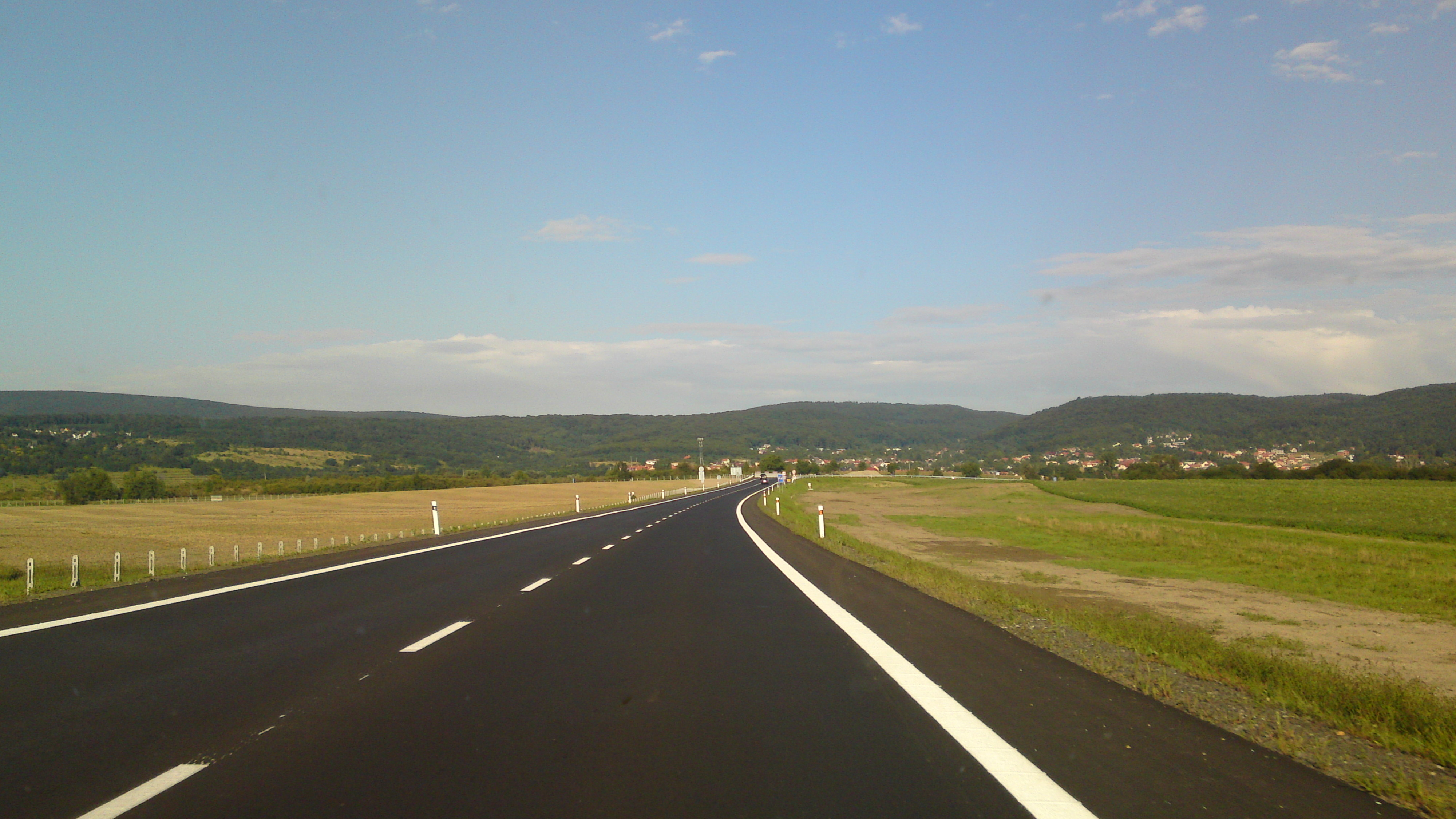 Einbahniger Zubringer auf der Trasse der zukünftigen Autobahn D4 bei Stupava, im Hintergrund die Kleinen Karpaten